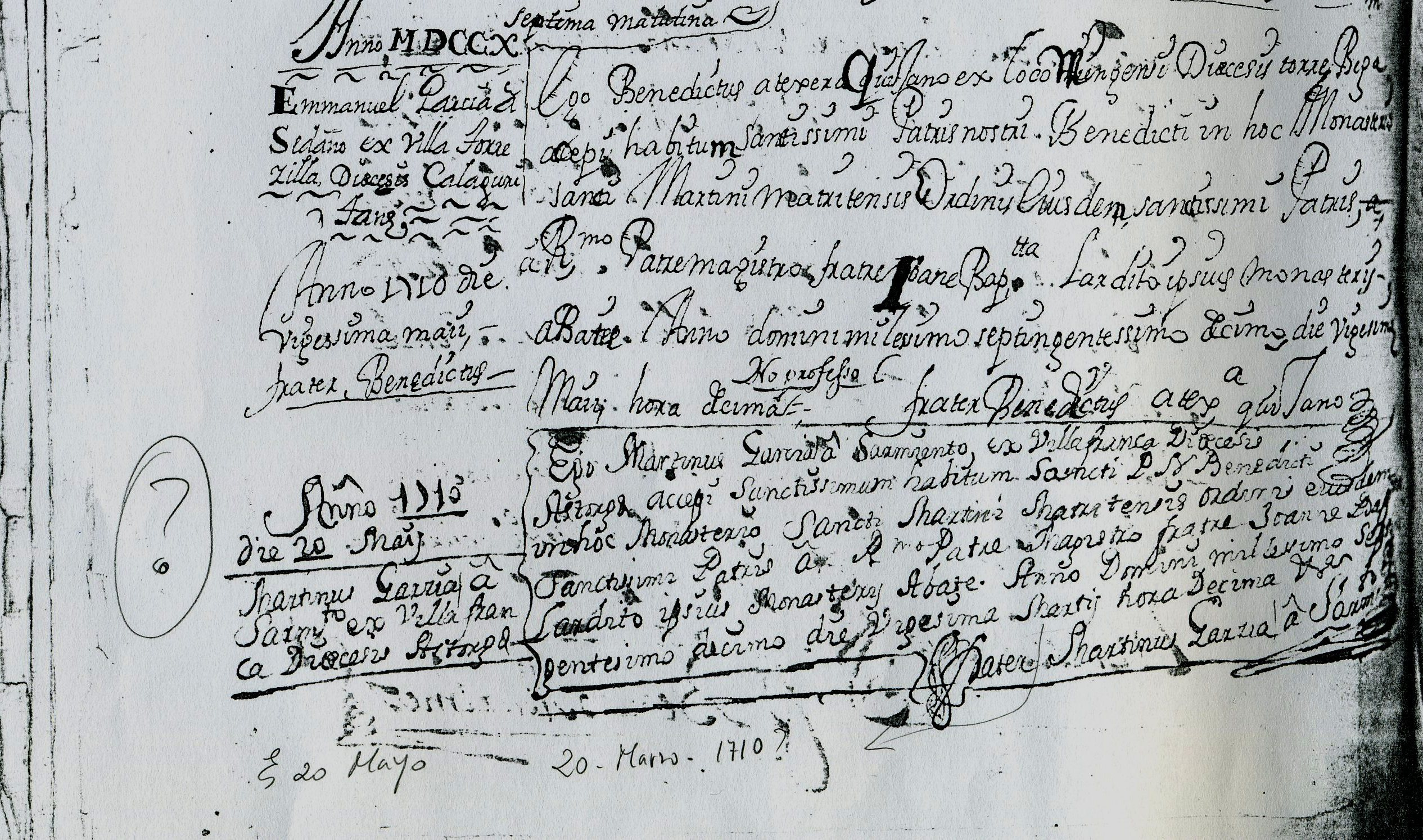 Acta da toma do hábito de Martín Sarmiento o 20.05.1710 no mosteiro beneditino de San Martín de Madrid. Ego Martinus Garcia â Sarmiento, ex Villafranca Dioecesis Astorga accepi sanctissimum habitum Sancti P[atris] N[ostri] Benedicti in hoc Monasteiro Sancti Martini Matritensis Ordinis eiusdem Sanctissimi Patris â R[everendissi]mo Patre Magistro fratre Joanne Bap[tista] Lardito ipsius Monasterii Abate. Anno Domini millessimo septingentesimo decimo die vigesima Martis hora decima. Frater Martinus Garcia a Sarmien[to]. "Eu Martín García Sarmiento, de Vilafranca, diocese de Astorga, recibín o santísimo hábito do noso santo pai Bieito neste mosteiro de San Martín de Madrid, da mesma Orde do Santo Pai, de mans do Reverendísimo Padre Maestro frei Juan Bautista Lardito, abade do dito mosteiro no ano mil setecentos dez o día 20, martes, ás dez horas".